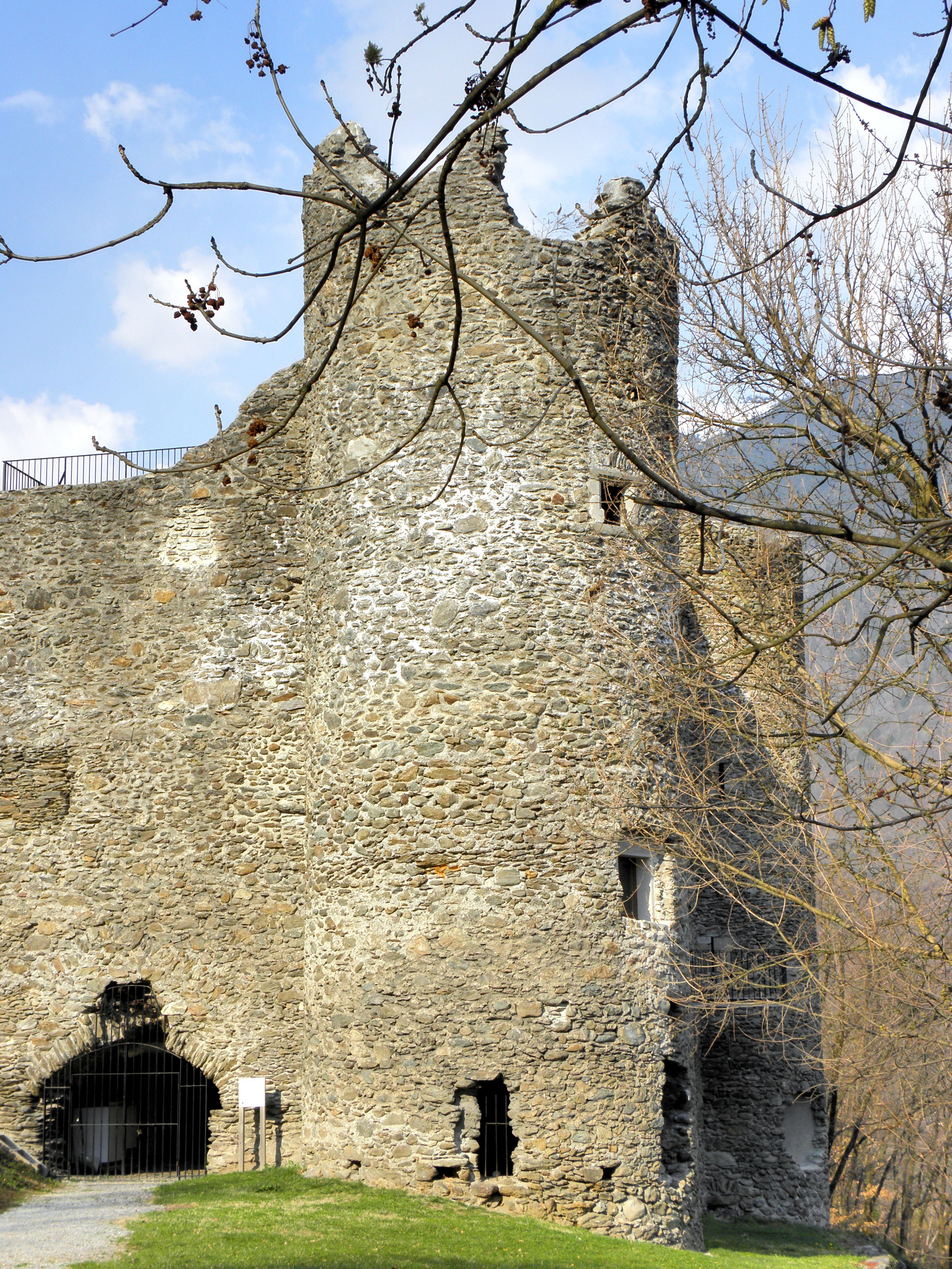 Tour sud ou Tour de la chapelle du château de Blay. Maison forte des seigneurs de Blay construite entre la fin du XIVe et le début du XV e siècle. Commune d'Esserts-Blay